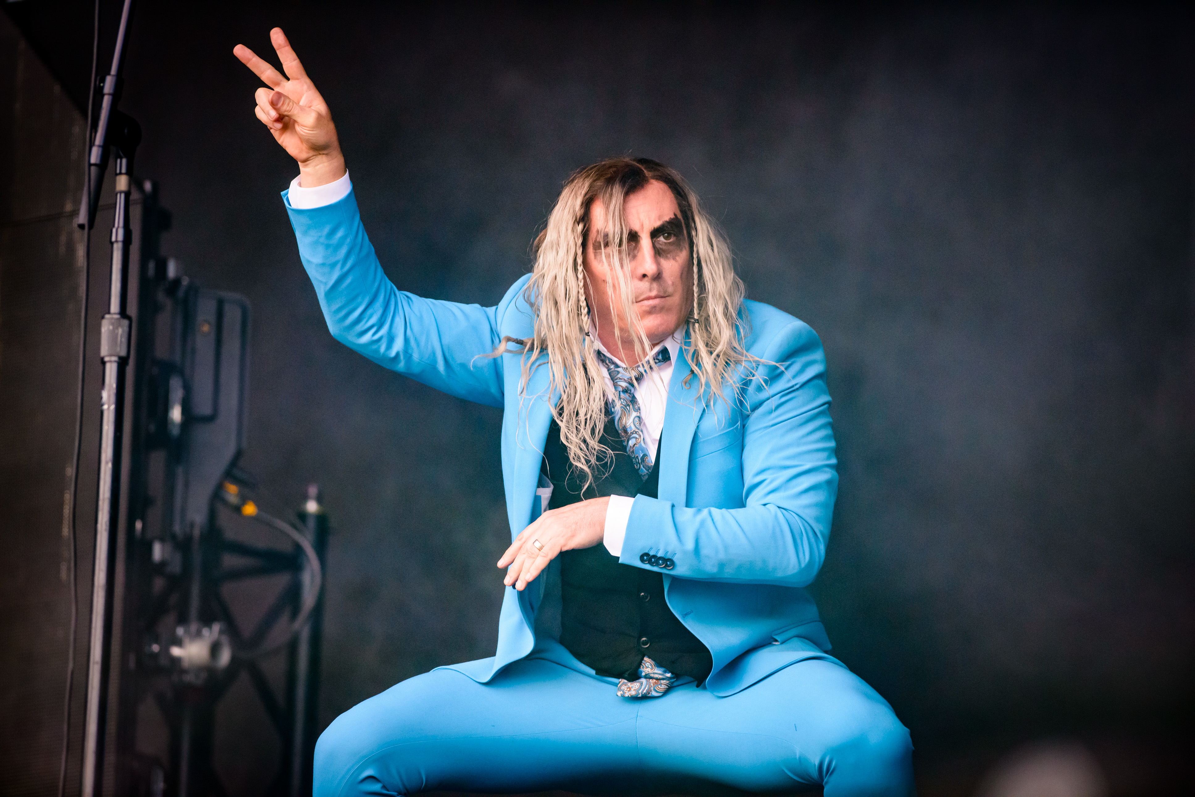 'Rock im Park 2018; Zeppelinfeld Nürnberg': 'A Perfect Circle'